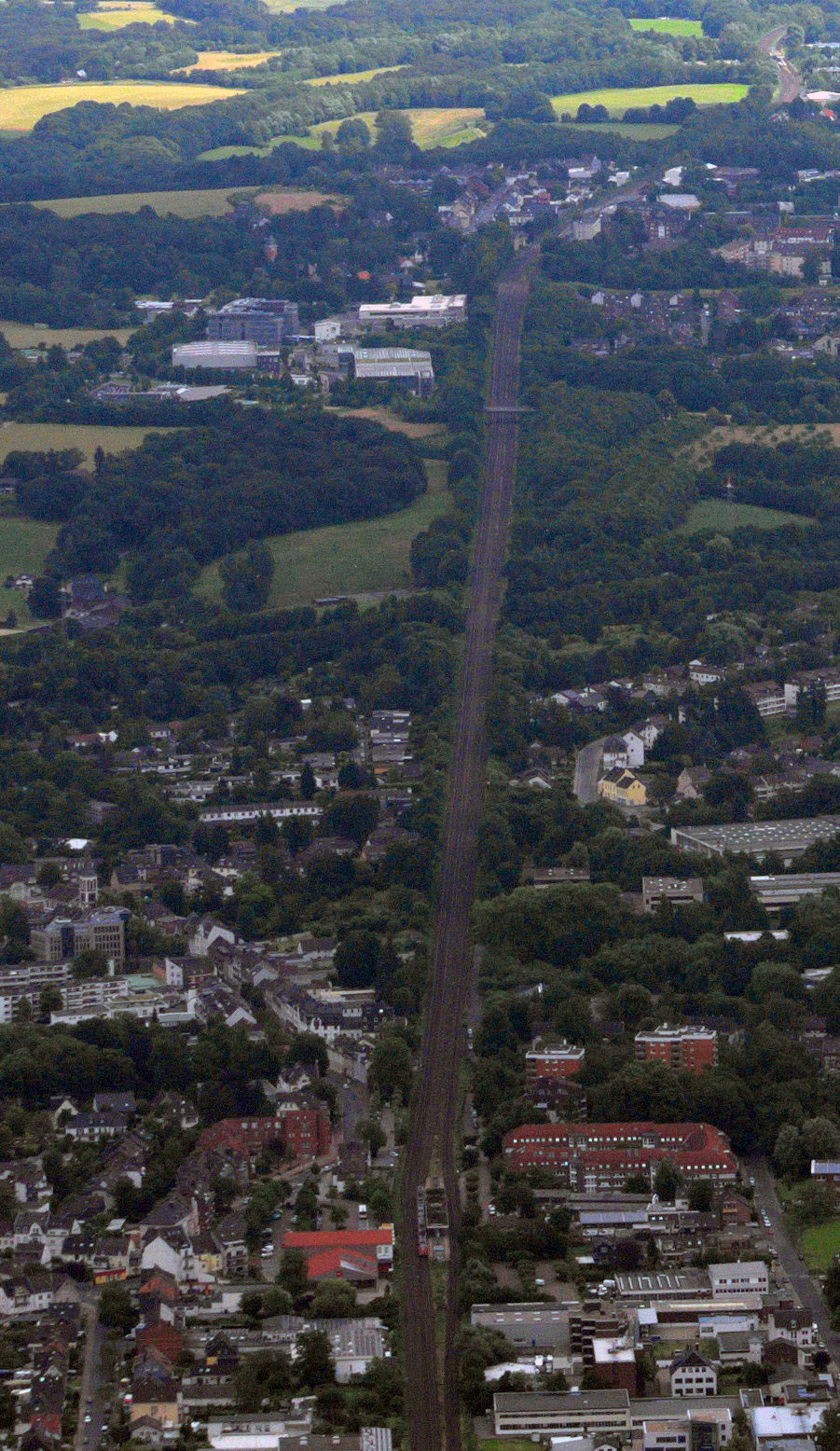 Eisenbahnsteilrampe zwischen Erkrath (unten) und Hochdahl oben). Blick nach Osten. Luftbild aus ca. 600m Höhe über Grund.